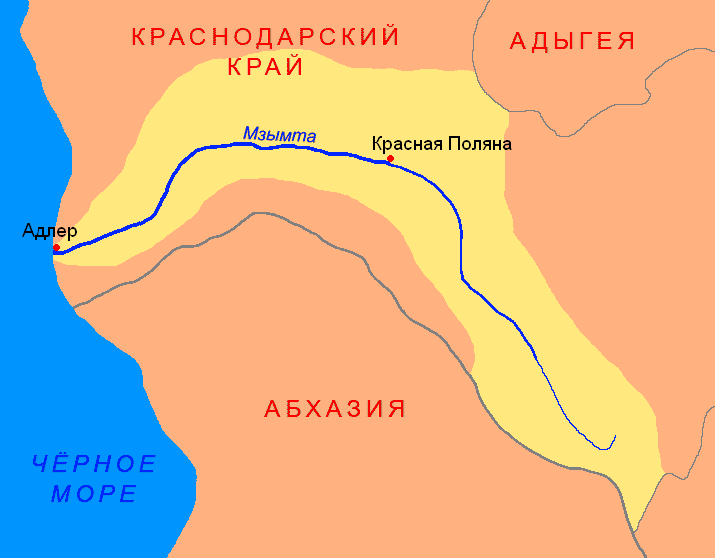 Схема бассейна Мзымты